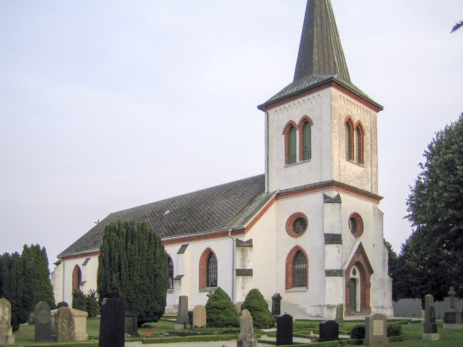 Bösarps kyrka